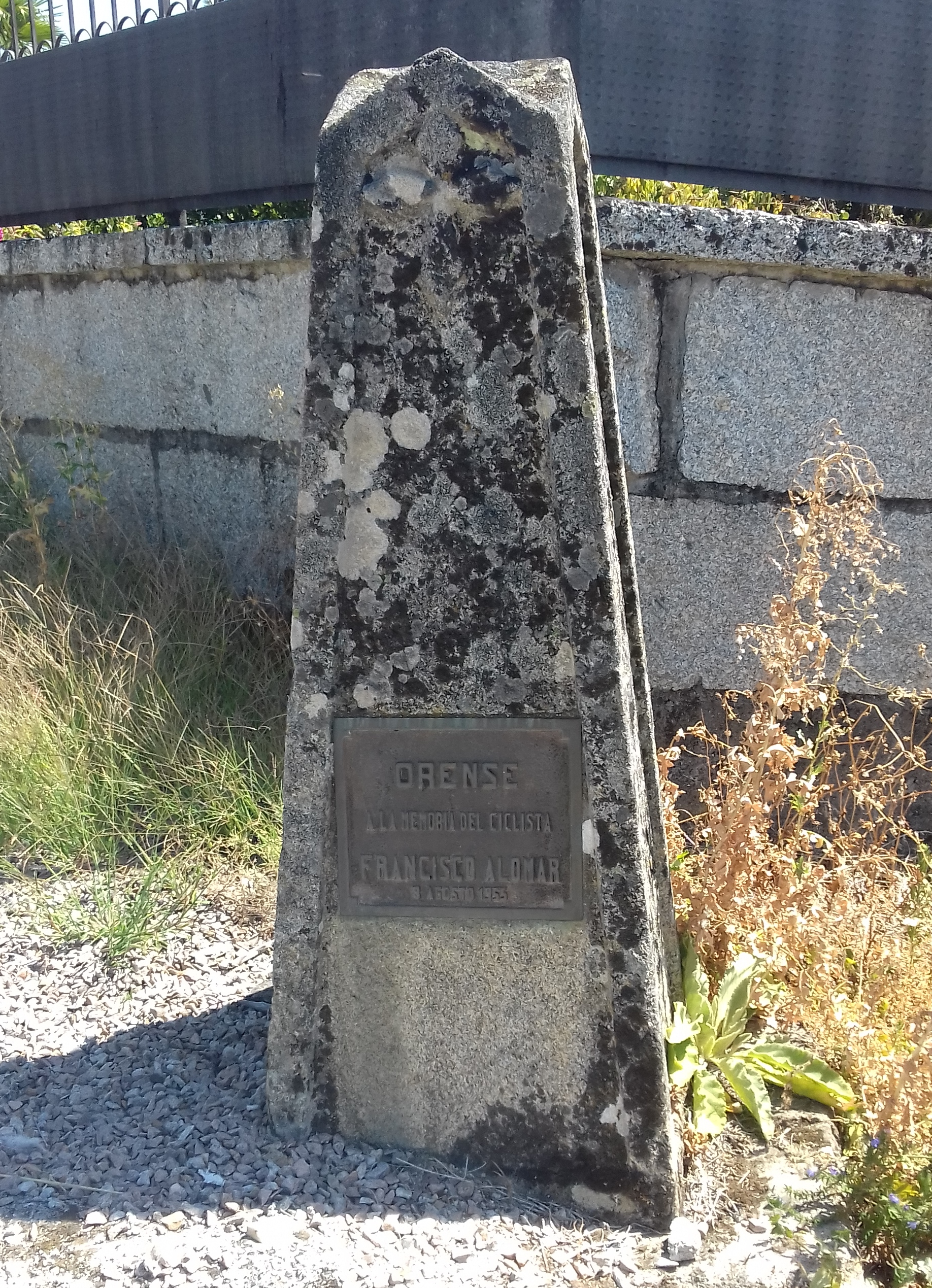 Monólito e placa en recordo a Francisco Alomar Florit no lugar do seu accidente mortal en Gustei (Coles)